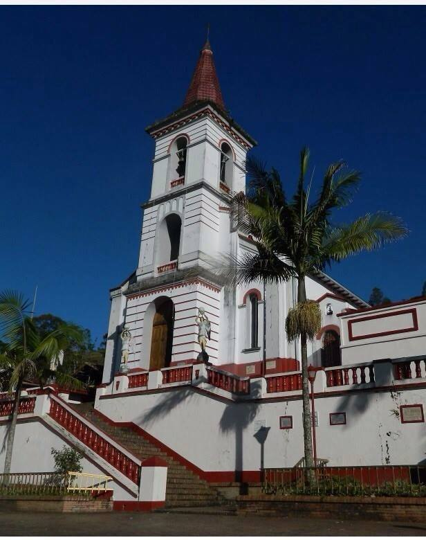 Iglesia Inmaculada Concepción de Ubalá Cundinamarca